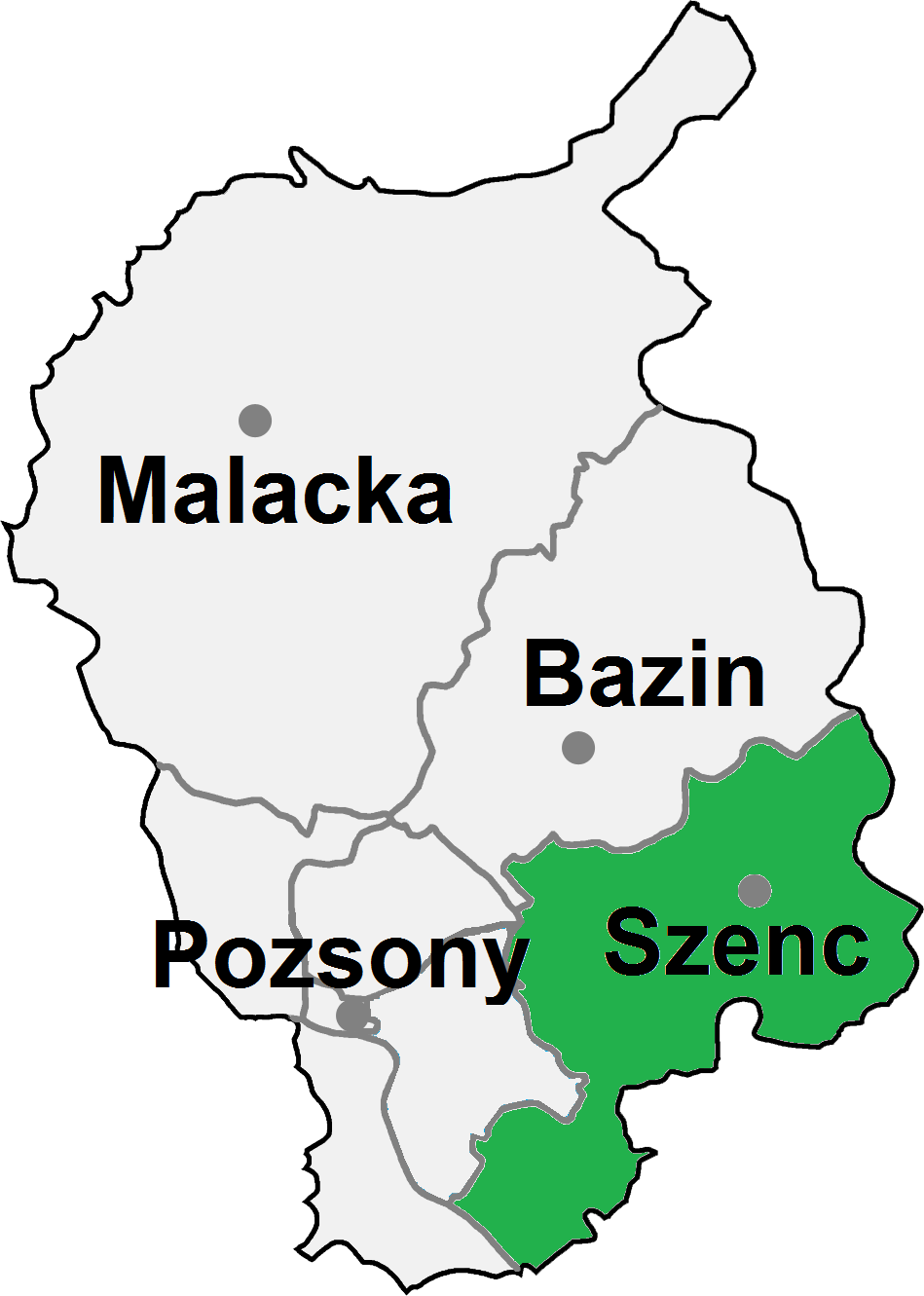 Szenci járás